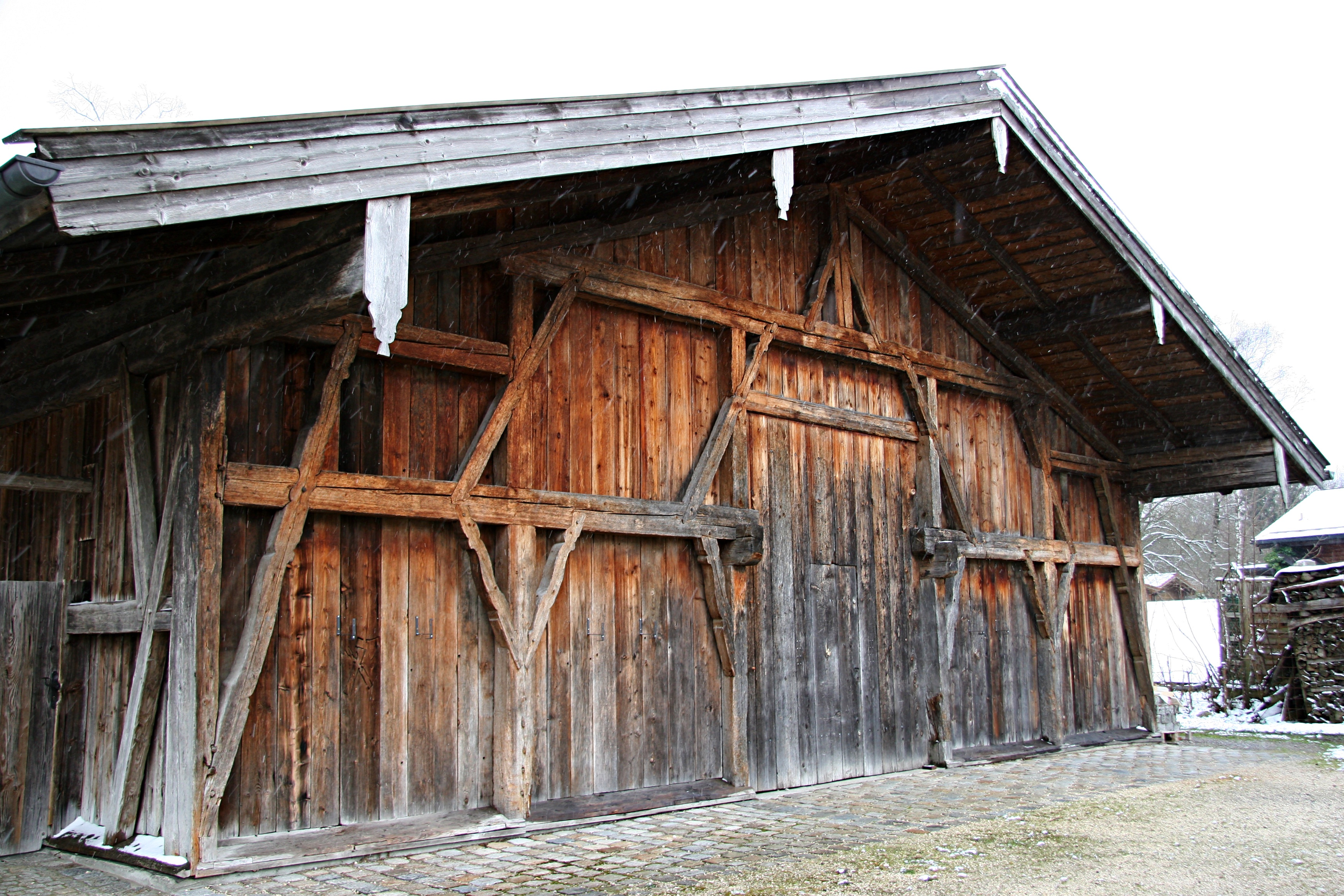 Bundwerkstadel, stattlicher Holzständerbau mit überstehendem Flachsatteldach (Verschalung), im Kern um 1785, bezeichnet 1842, 1991 aus Oberdarching, Bergstraße 52, transferiert